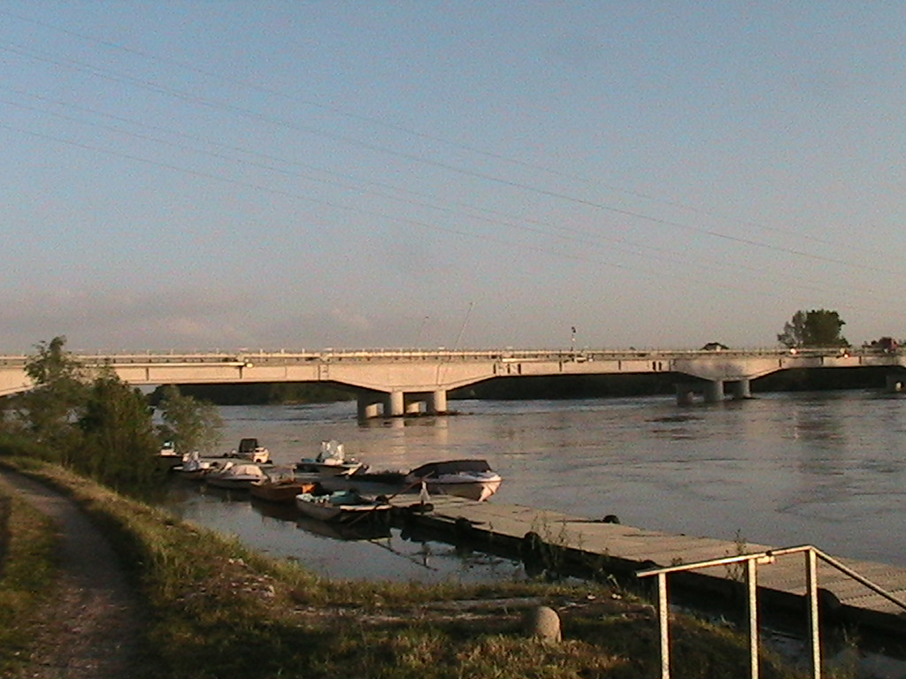 Casalmaggiore - Ponte stradale sul fiume Po in piena 002